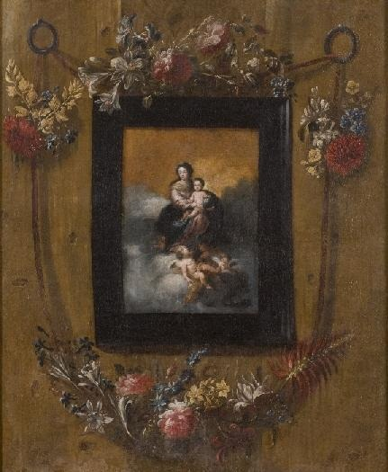 Trampantojo con fondo de madera con guirnalda de flores, rosas, lirios, jazmines, hortensias y claveles, que crean una orla en la que se enmarca un lienzo donde aparecen la Virgen María y el Niño Jesús.